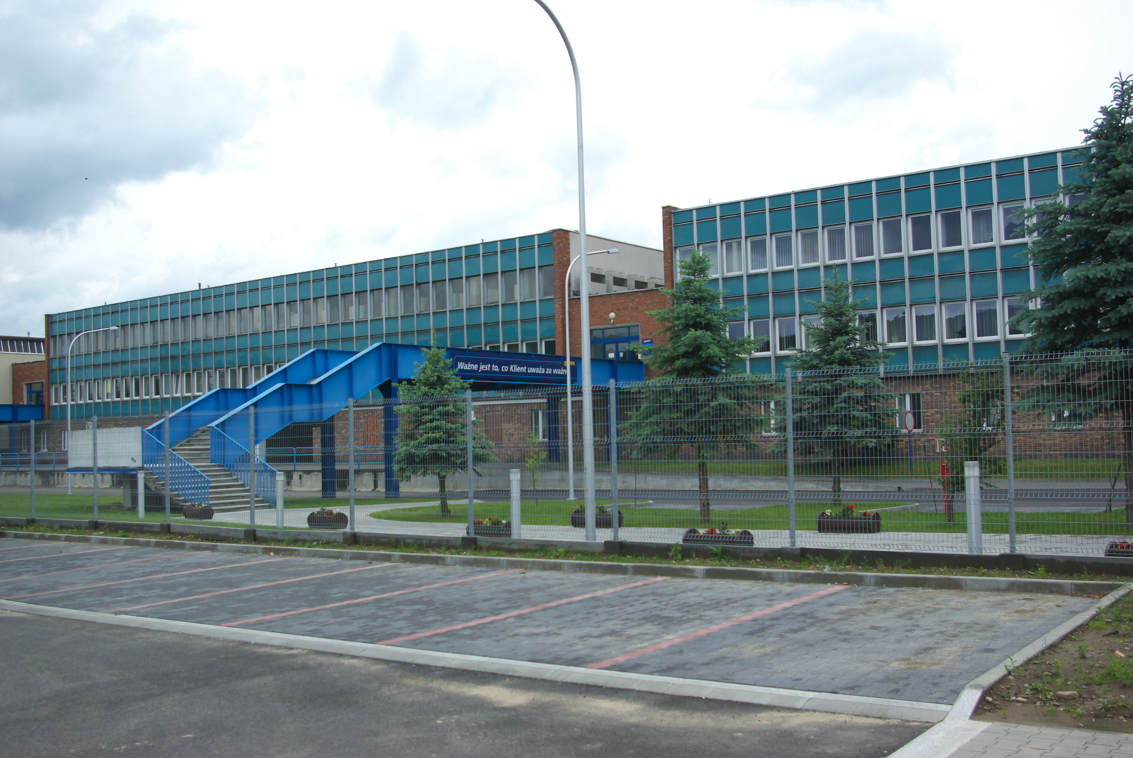 Stomil Sanok, ulica Przemyska